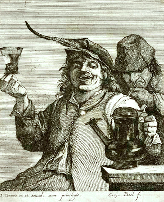 Le joyeux buveur